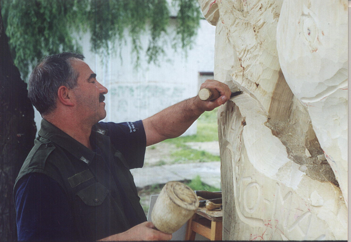 Zdzisław Połącarz malarz malowany